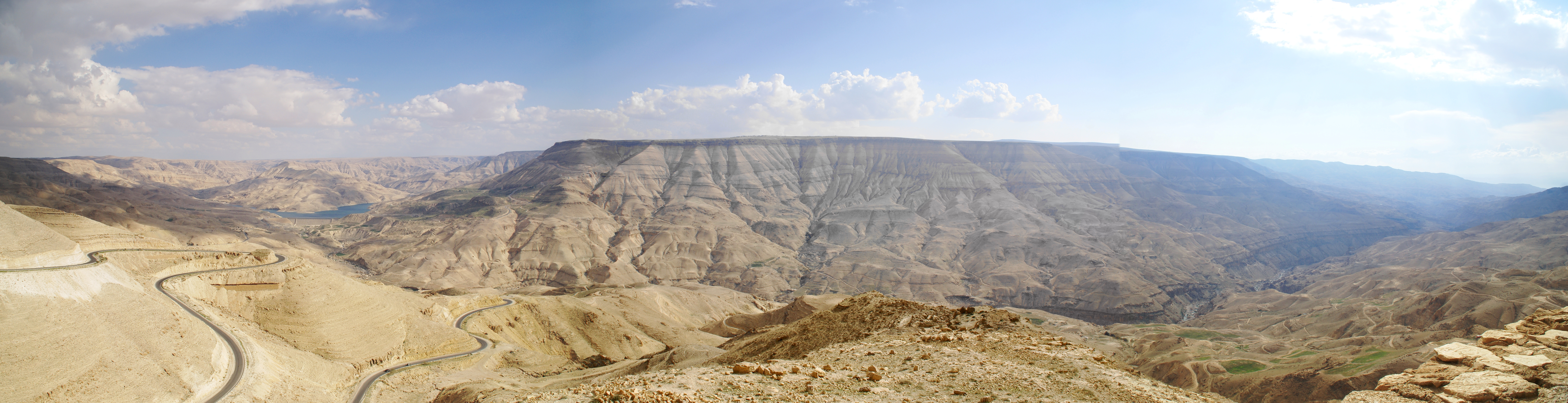 Panoramafoto vom Wadi Mujib, dem "Grand Canyon von Jordanien"